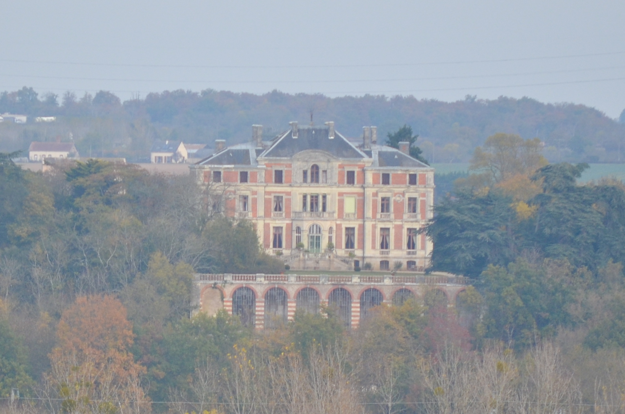 Palais Briau, vu depuis Saint-Florent-le-Vieil - Varades (Loire-Atlantique)